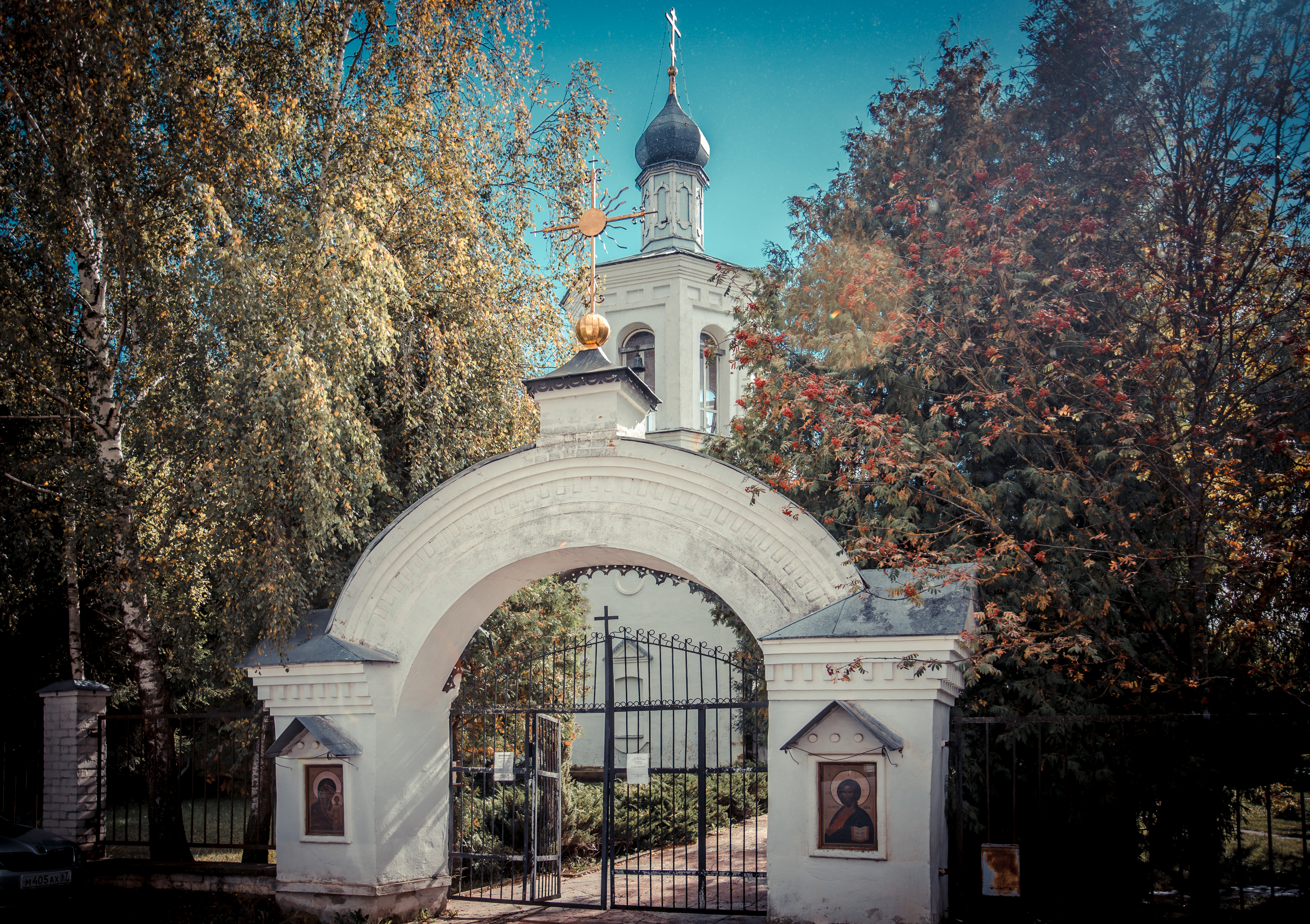 Церковь Антония и Феодосия Печерских: Печерск, Смоленский район, Смоленская область